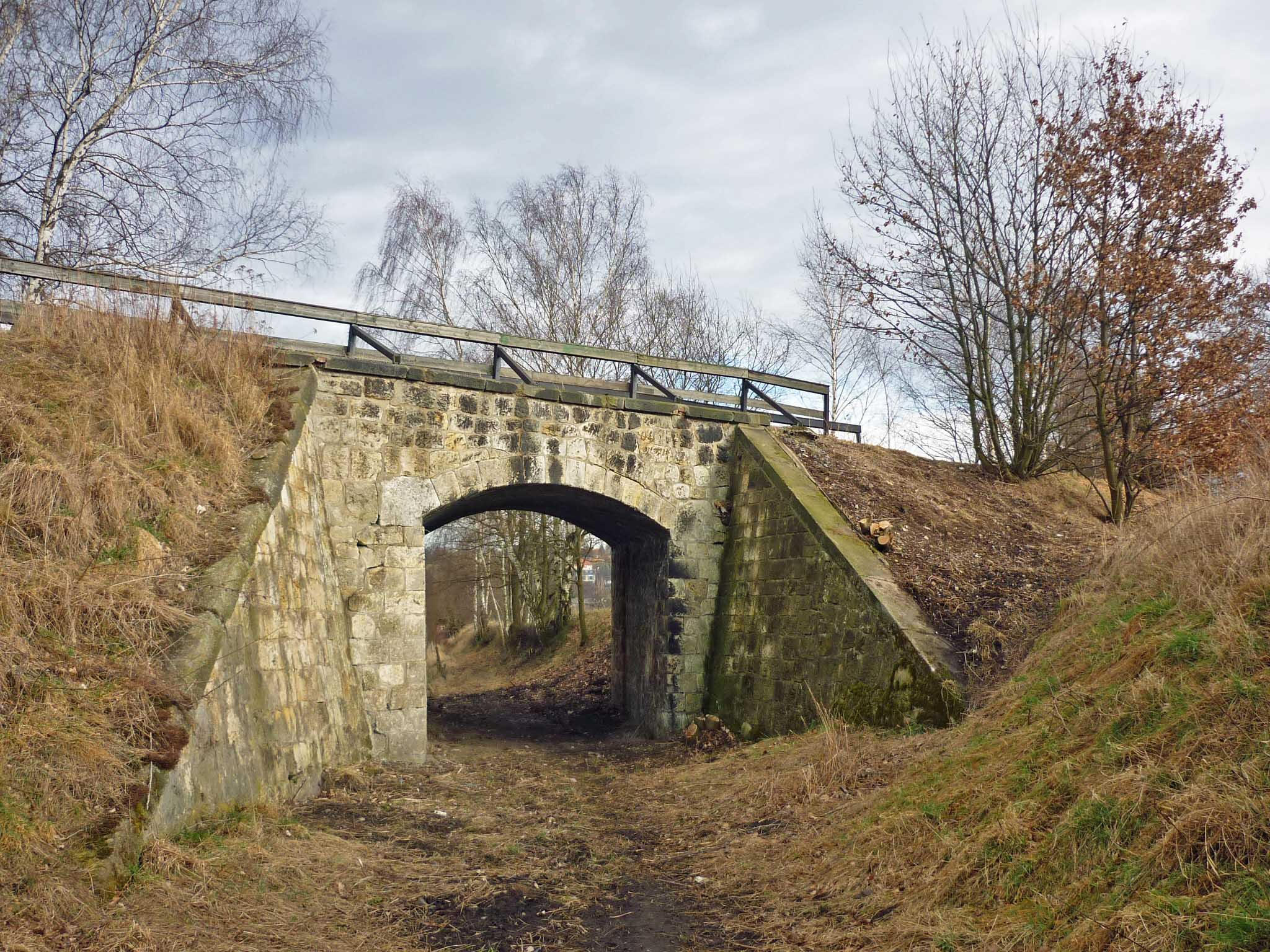 Eisenbahnbrücke (km 7,9, Kohlenstraße) bei Kleinnaundorf der ehem. Bahnstrecke Dresden-Possendorf (Windbergbahn).